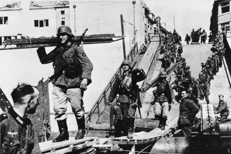 Pioniere bauen Notbrücke bei Maastricht. 14. 5. 1940